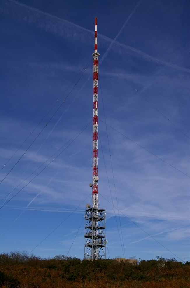 TV transmitter, center brittany. (Plounéour-Ménez, Department of Finistère (29))